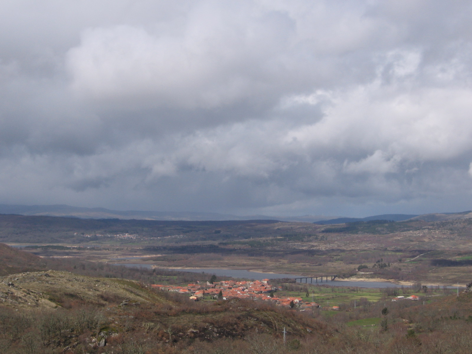 Tourém e o vale do rio Salas, Montalegre, Portugal